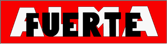 Logo de Almafuerte, banda argentina de Heavy Metal